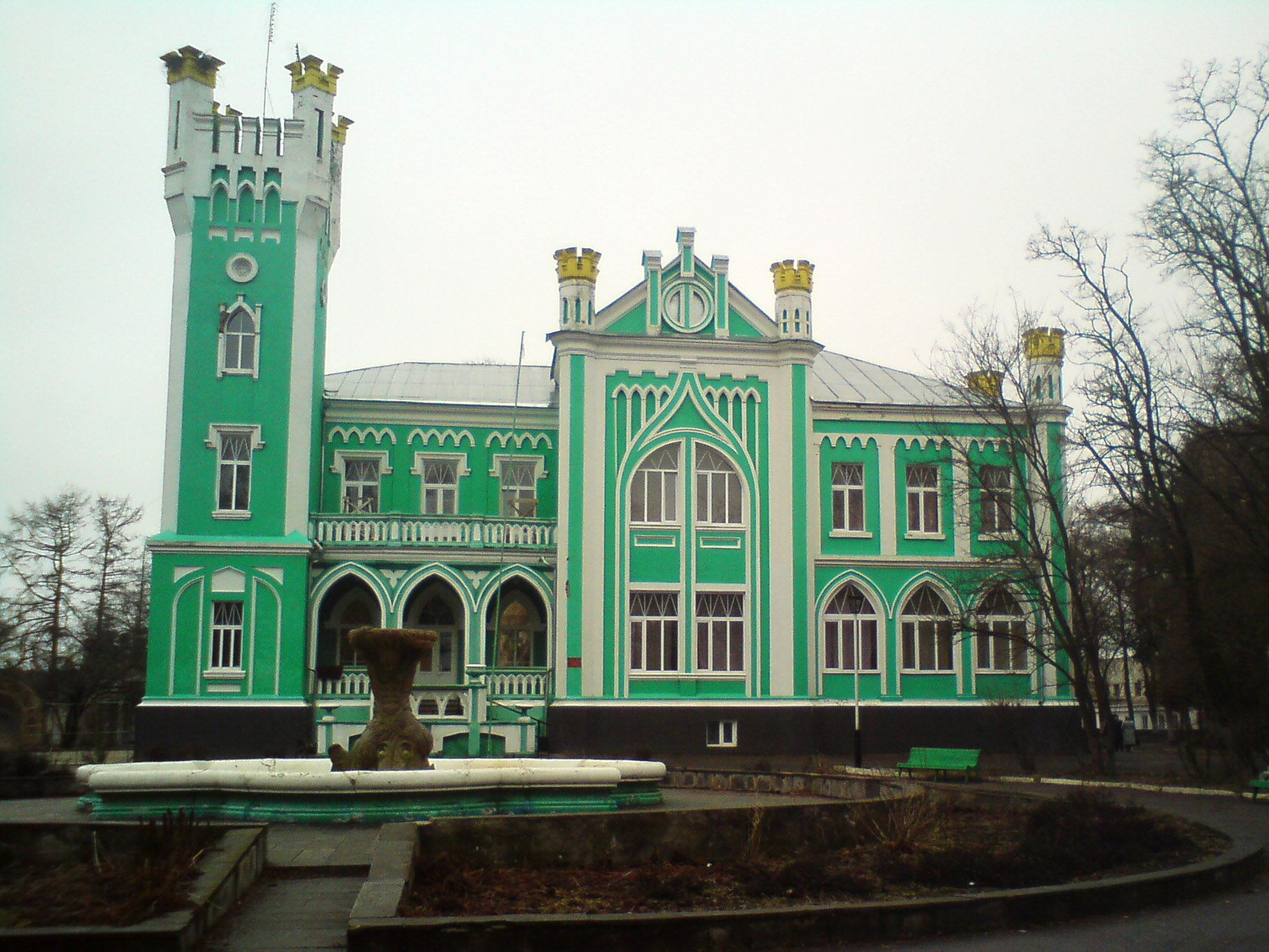 Загородный дом «Вьюнки» фабриканта Сапожкова